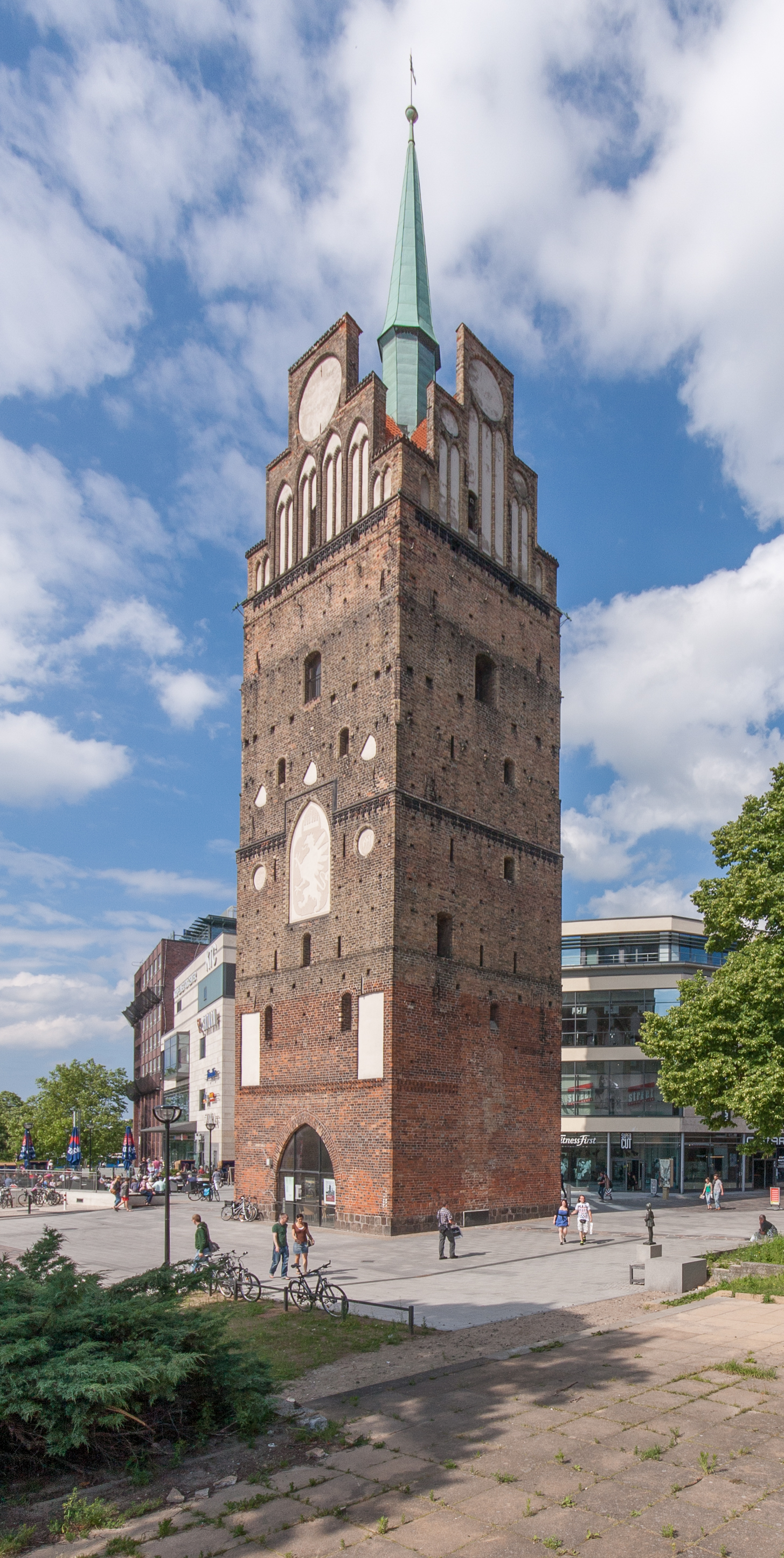 Das Kröpeliner Tor in Rostok